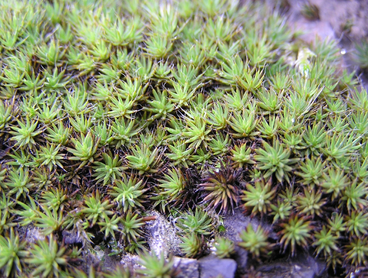 Polytrichum piliferum auf einem Schieferfelsen im Ahrtal (Deutschland)